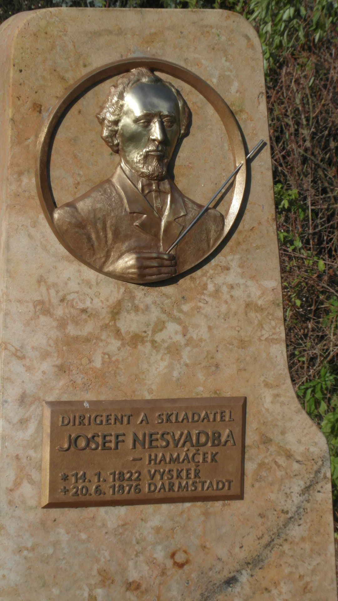 Monument voor Nesvadba, geboren in Vysker